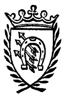 Grafika z ksiażki Wiktora Wittyga - Nieznana szlachta i jej herby